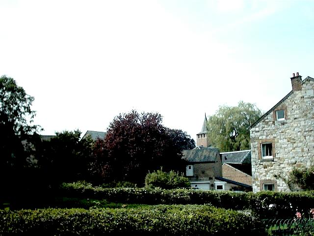 Vue du centre de Xhoris (église dans le fond) Description: Village de XhorisSource: Pierre-Jacques DESPALicence